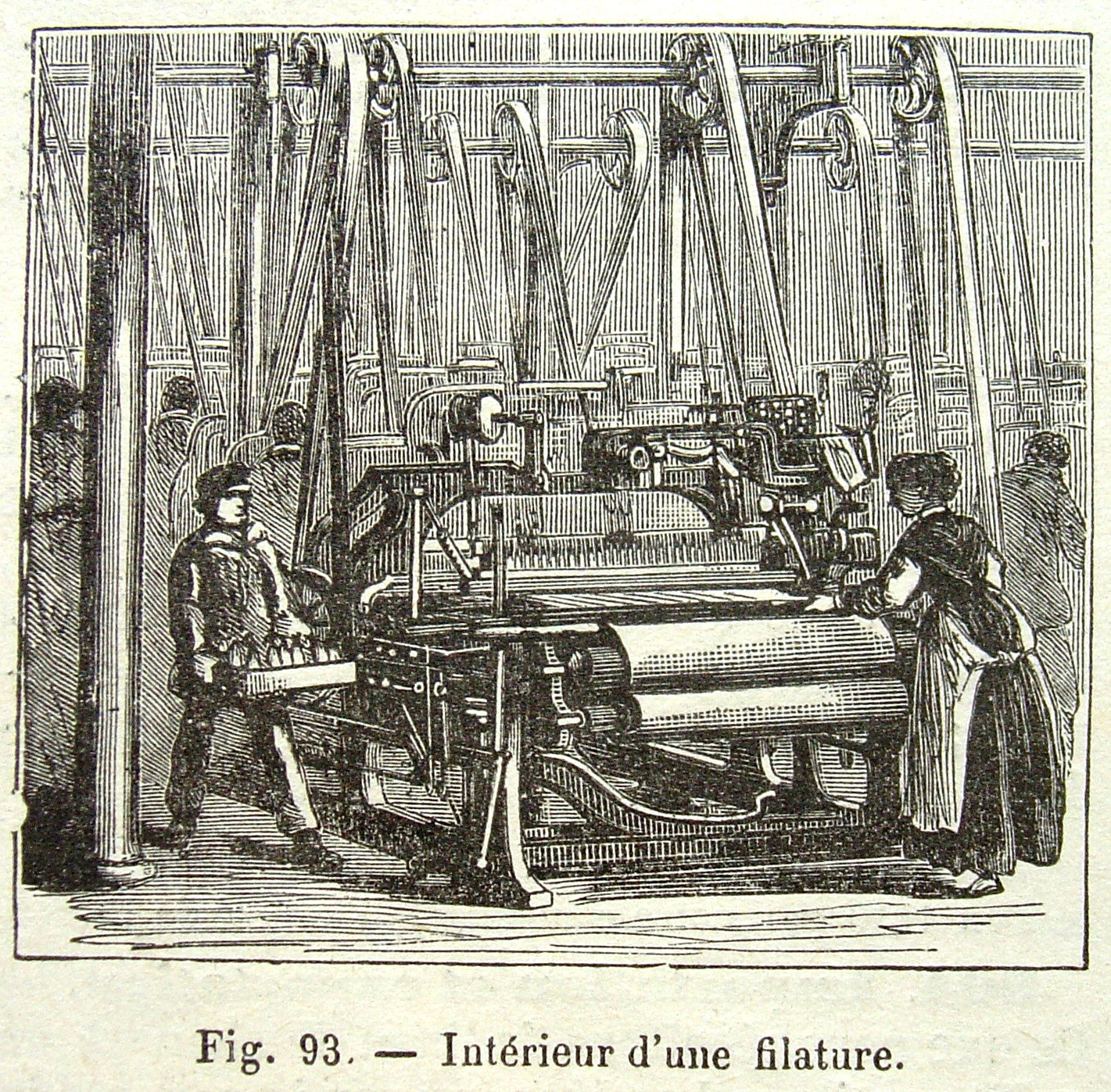 Filature